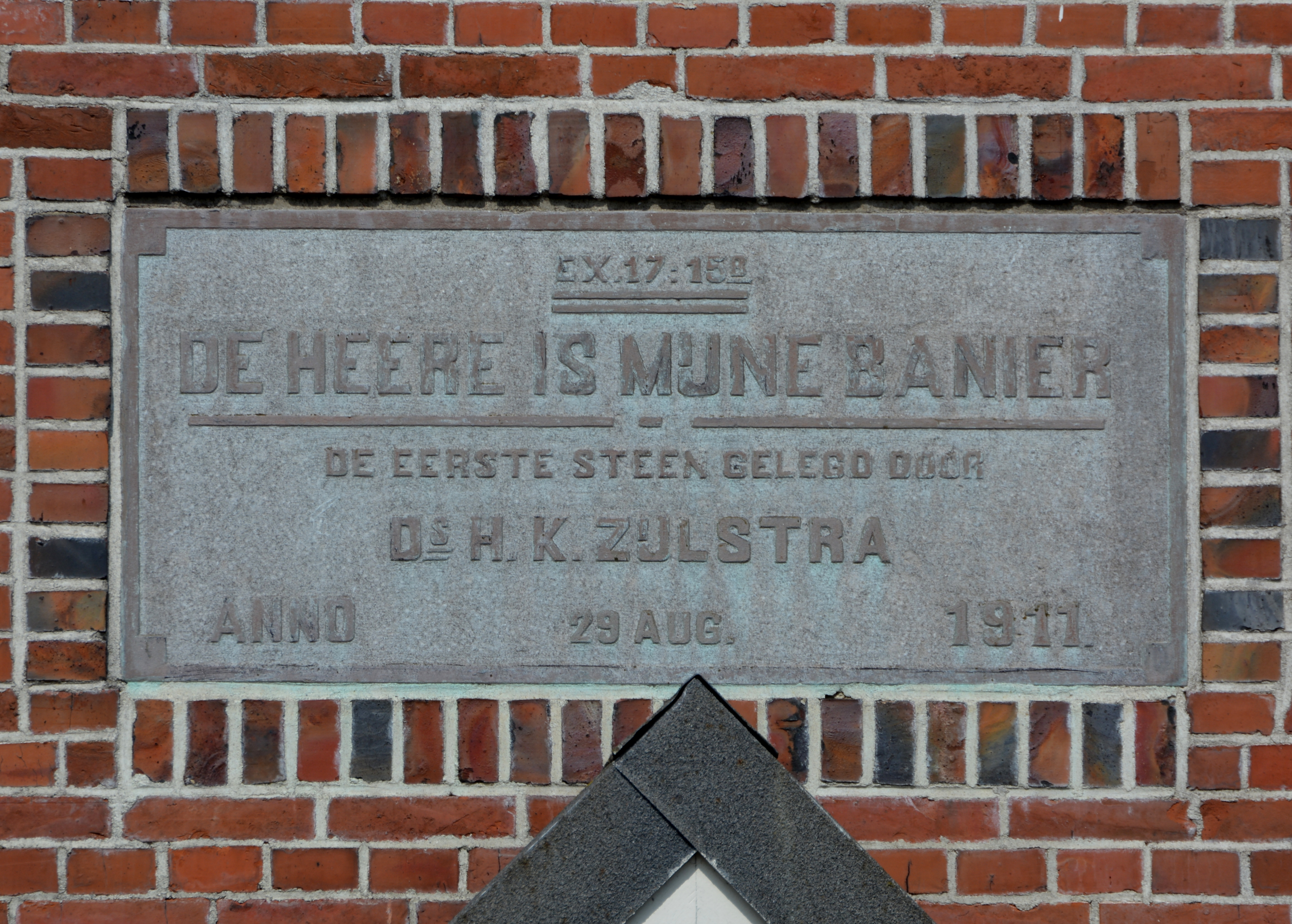 Twijzelerheide, Gereformeerde kerk, gevelsteen